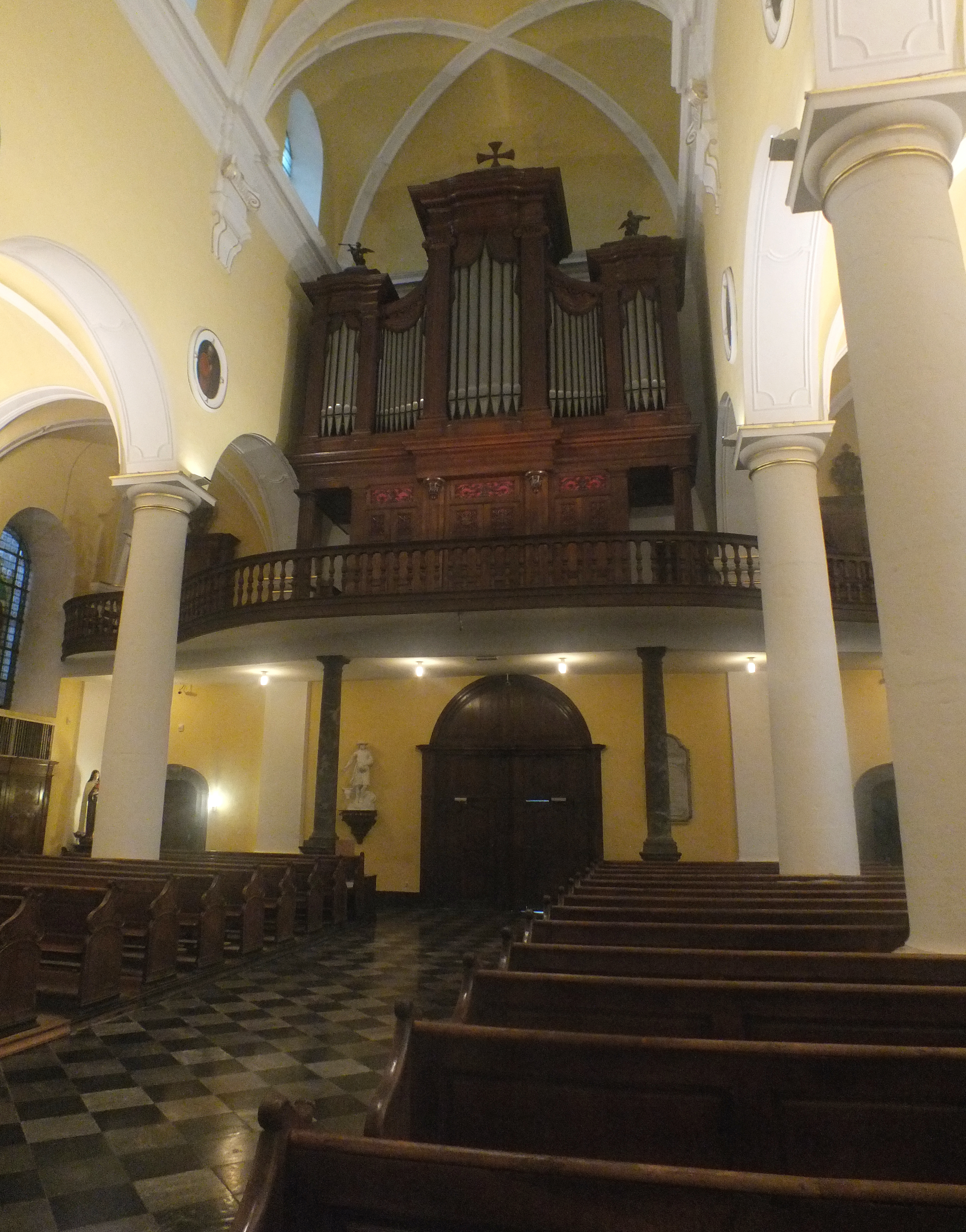 Orgue Wilhelm Korfmacher (1841) de l'église Saint-Sébastien de Stavelot (Belgique).